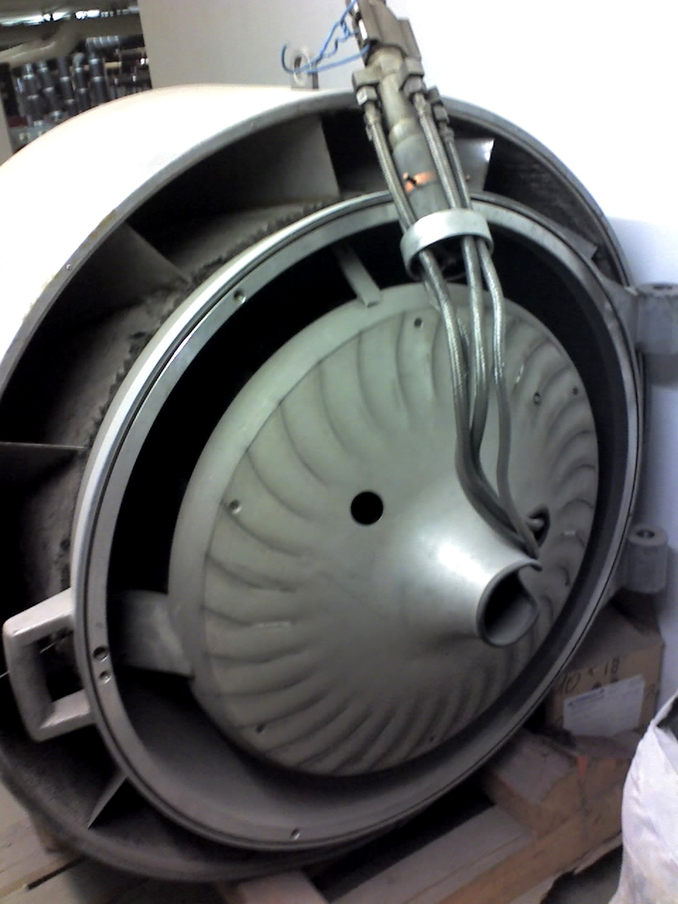 Brenner eines Flammrohrrauchrohrkessels der Staatsbad Bad Steben GmbH der normal Gas verfeuert jedoch auch leichtes Öl verbrennen kann